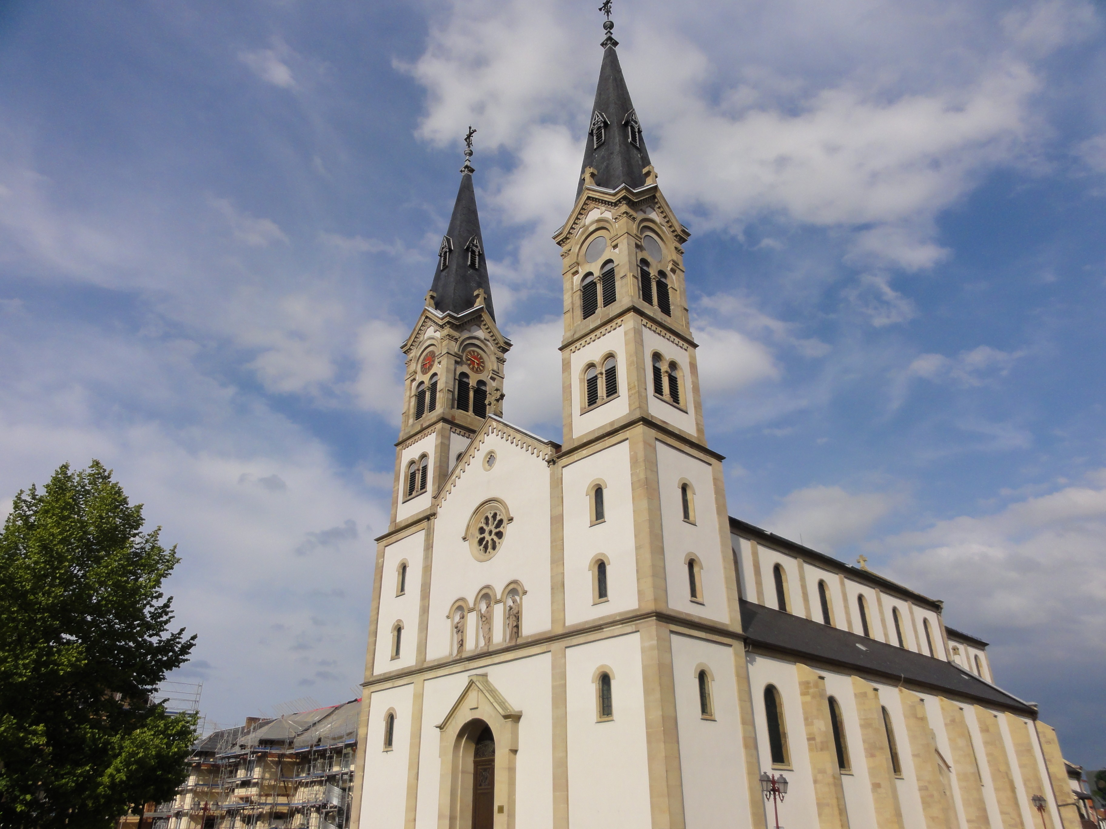 Alsace, Bas-Rhin, Église Saint-Symphorien d'Illkirch (IA00023076).